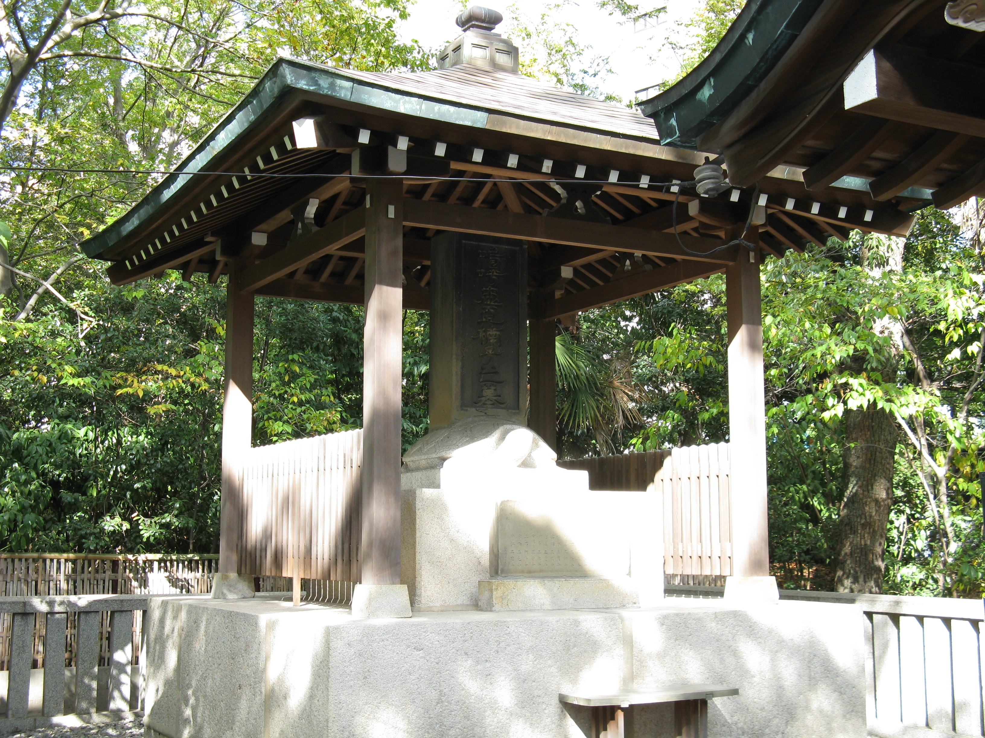 湊川神社 楠木正成墓碑